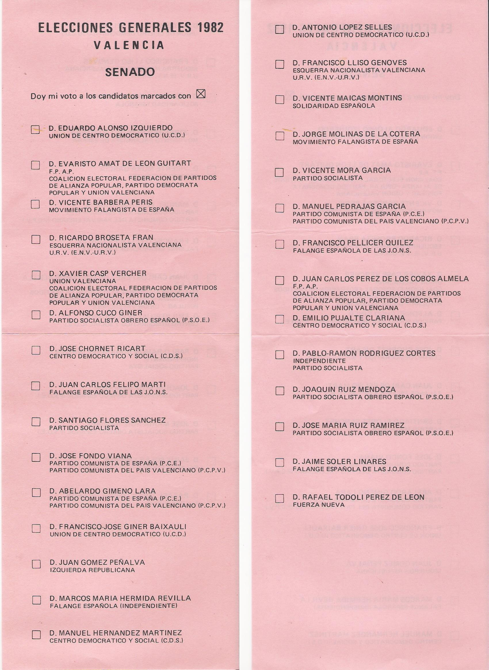 Papeleta electoral para el Senado de España por la provincia de Valencia en 1982. Está impresa a dos caras, que aquí se muestran una junto a la otra.